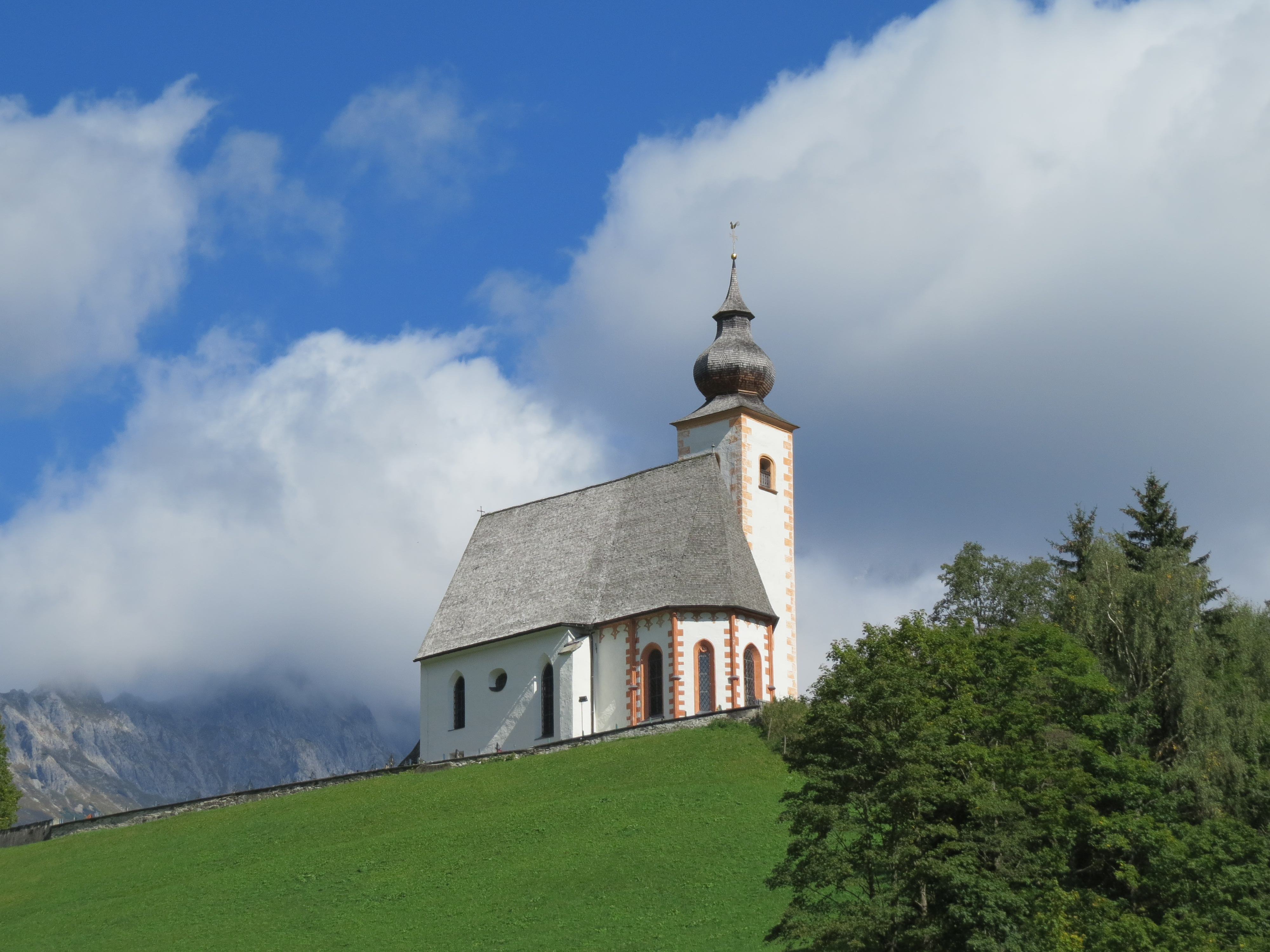 Kath. Pfarrkirche hl. Nikolaus und Friedhof